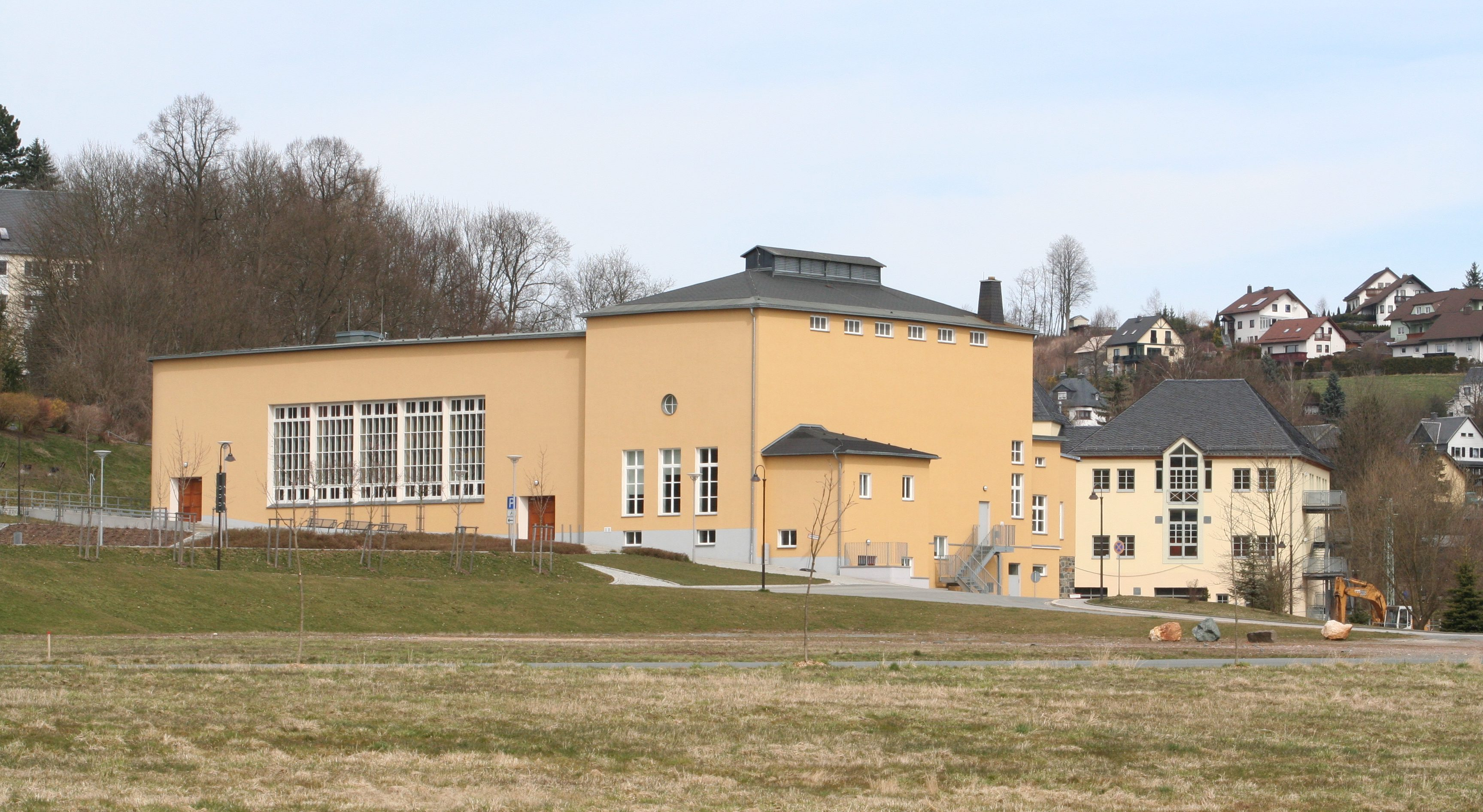 evangelische Stadtkirche St. Georg in Neustadt bei Coburg, Landkreis Coburg